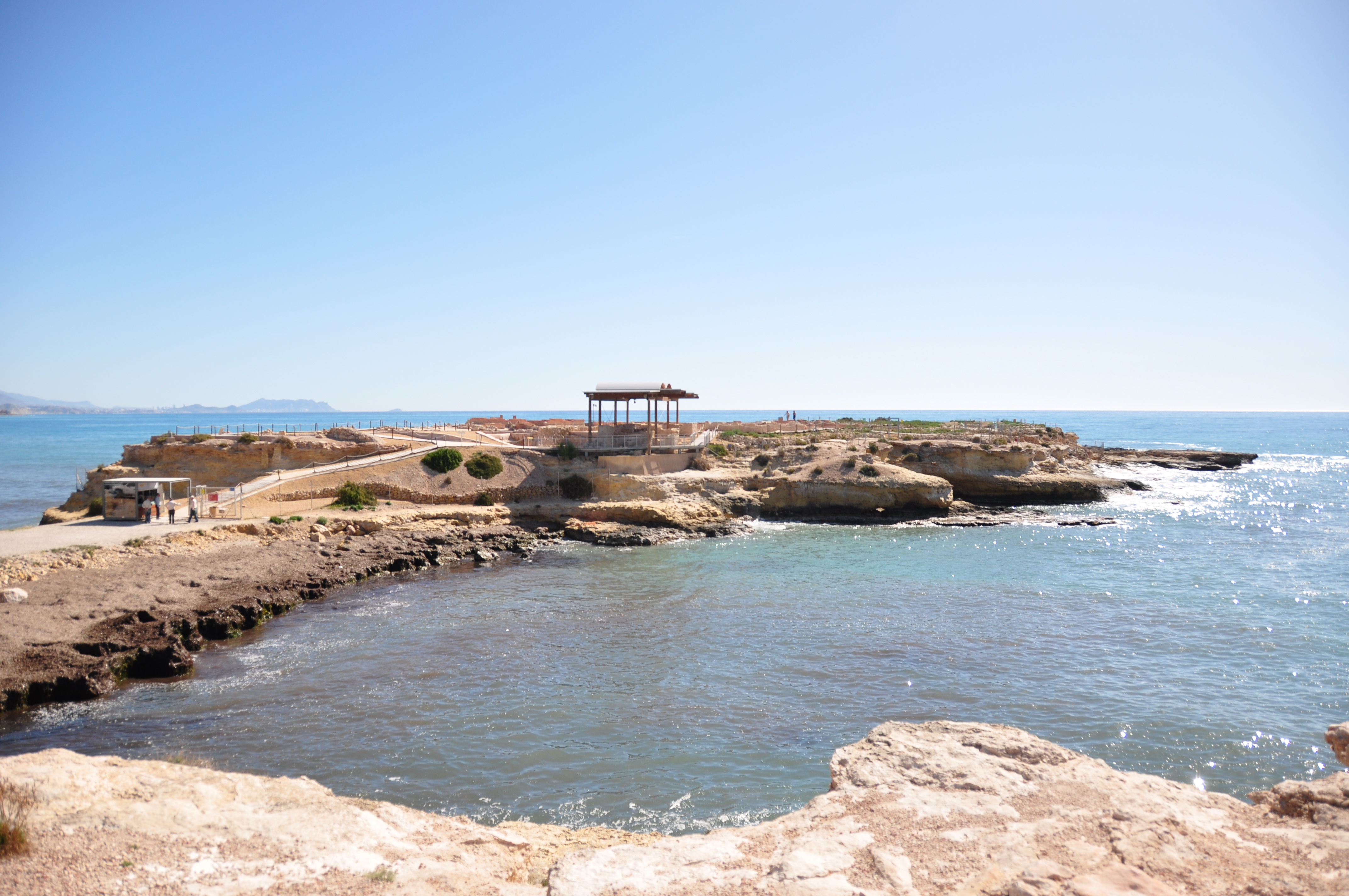 Illeta dels Banyets — El Campello, Costa Blanca, Valencia. Le site archéologique de La Isleta.